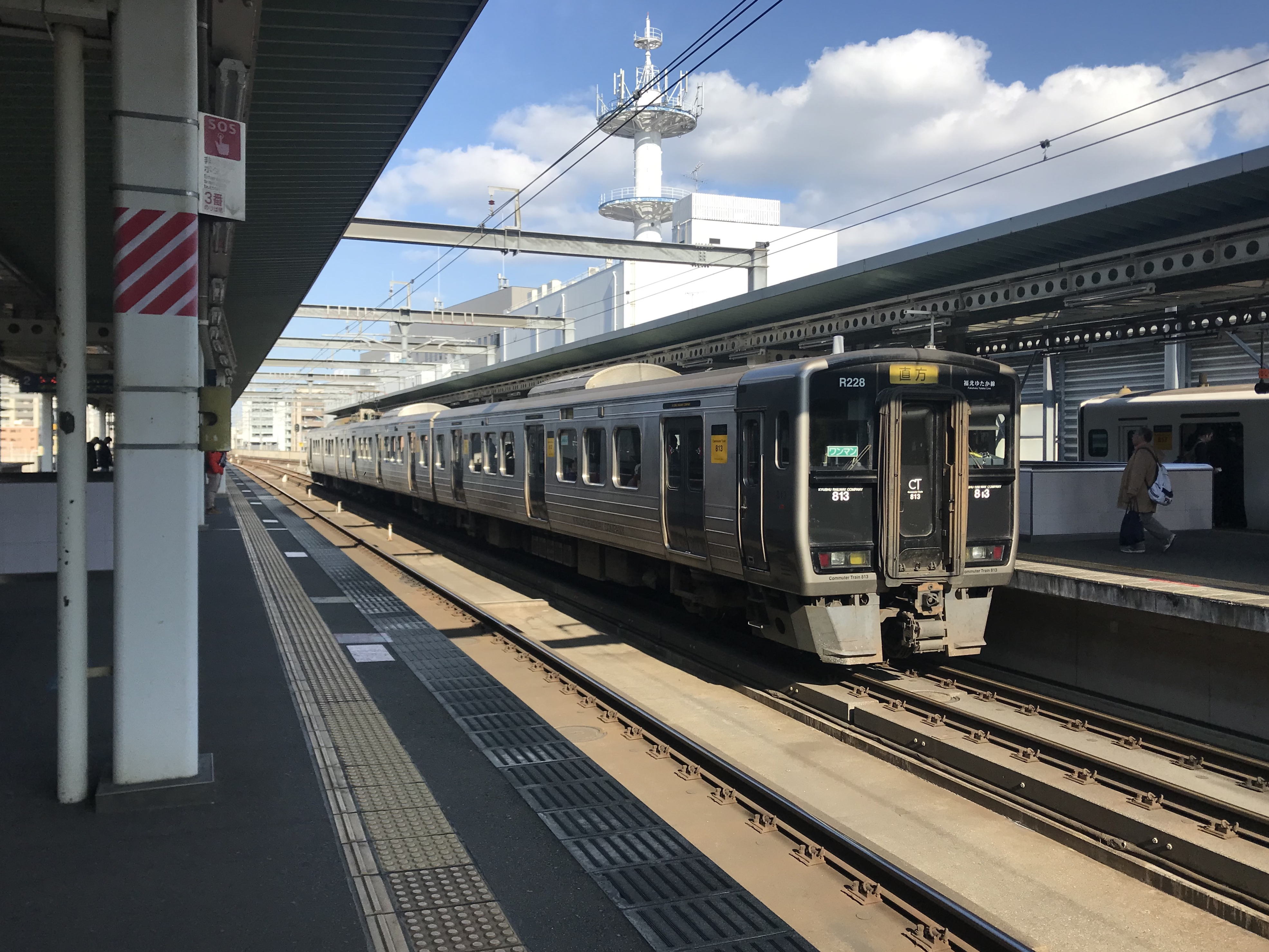 吉塚駅を発車した直方行き列車